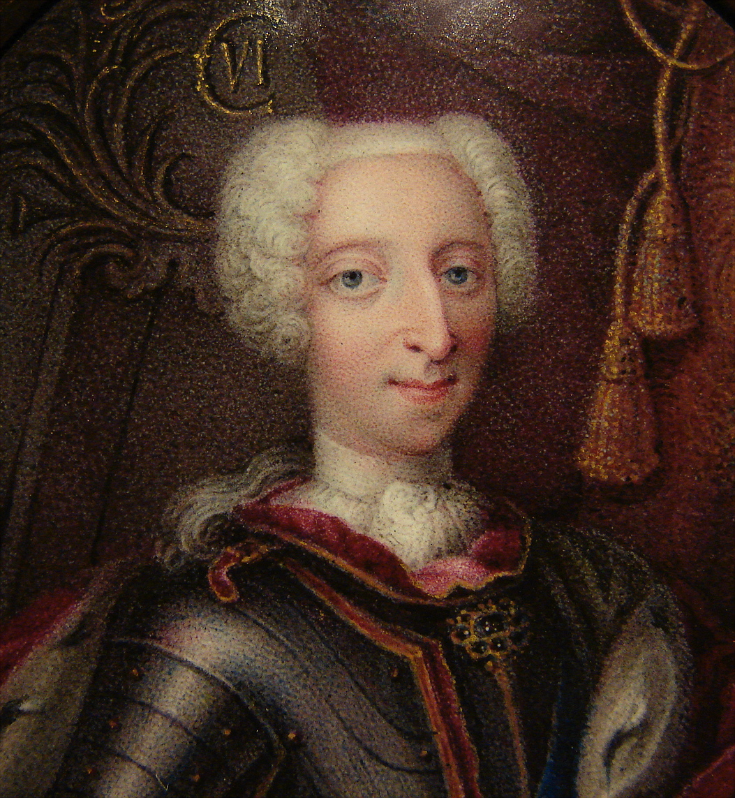 Miniature af Christian VI af Danmark og Norge (1699-1746), Frederiksborg Slot, Hillerød, Sjælland